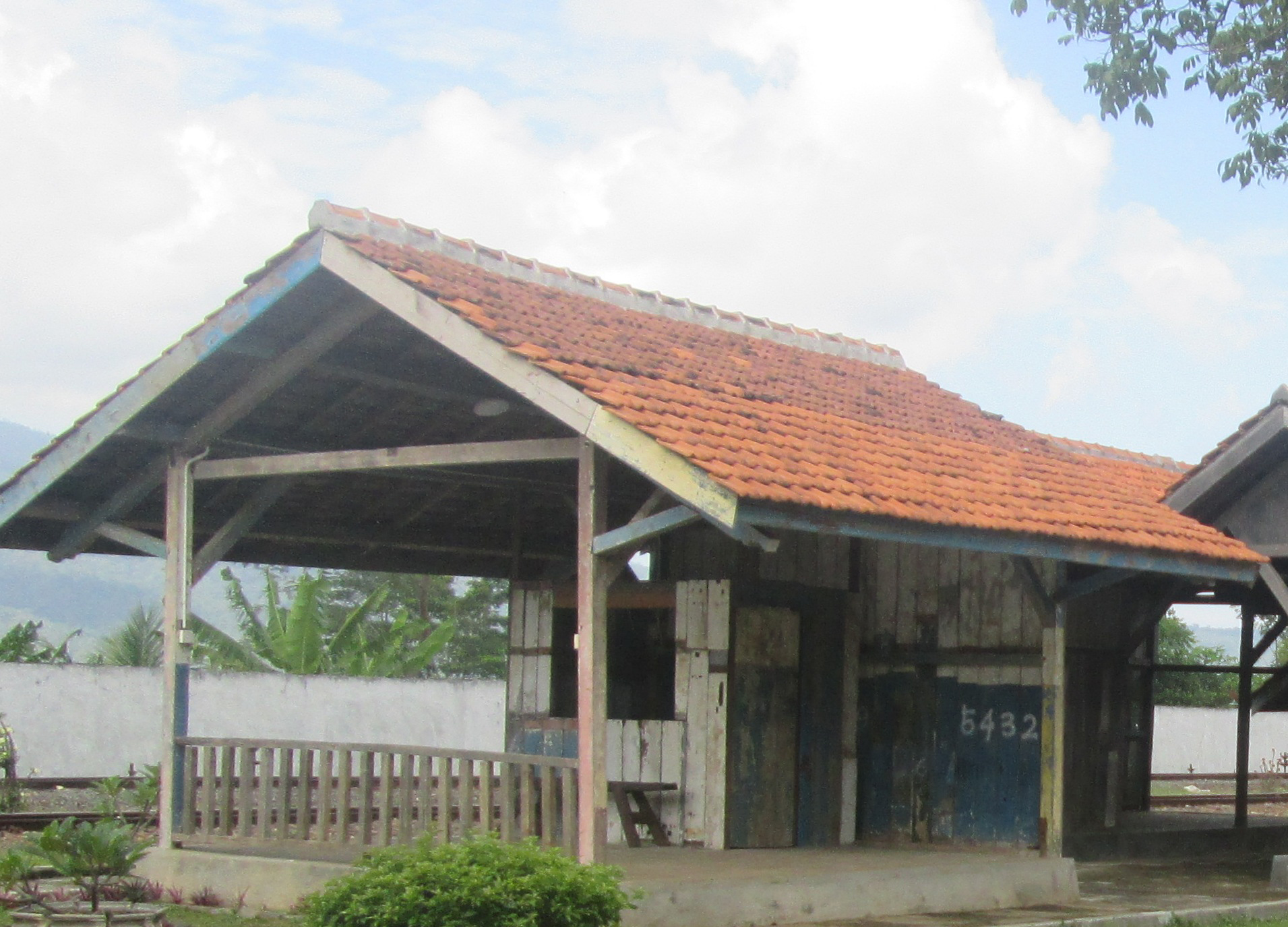 Stasiun Cikoya, telah dipindah ke Museum Kereta Api Ambarawa sejak 2016.